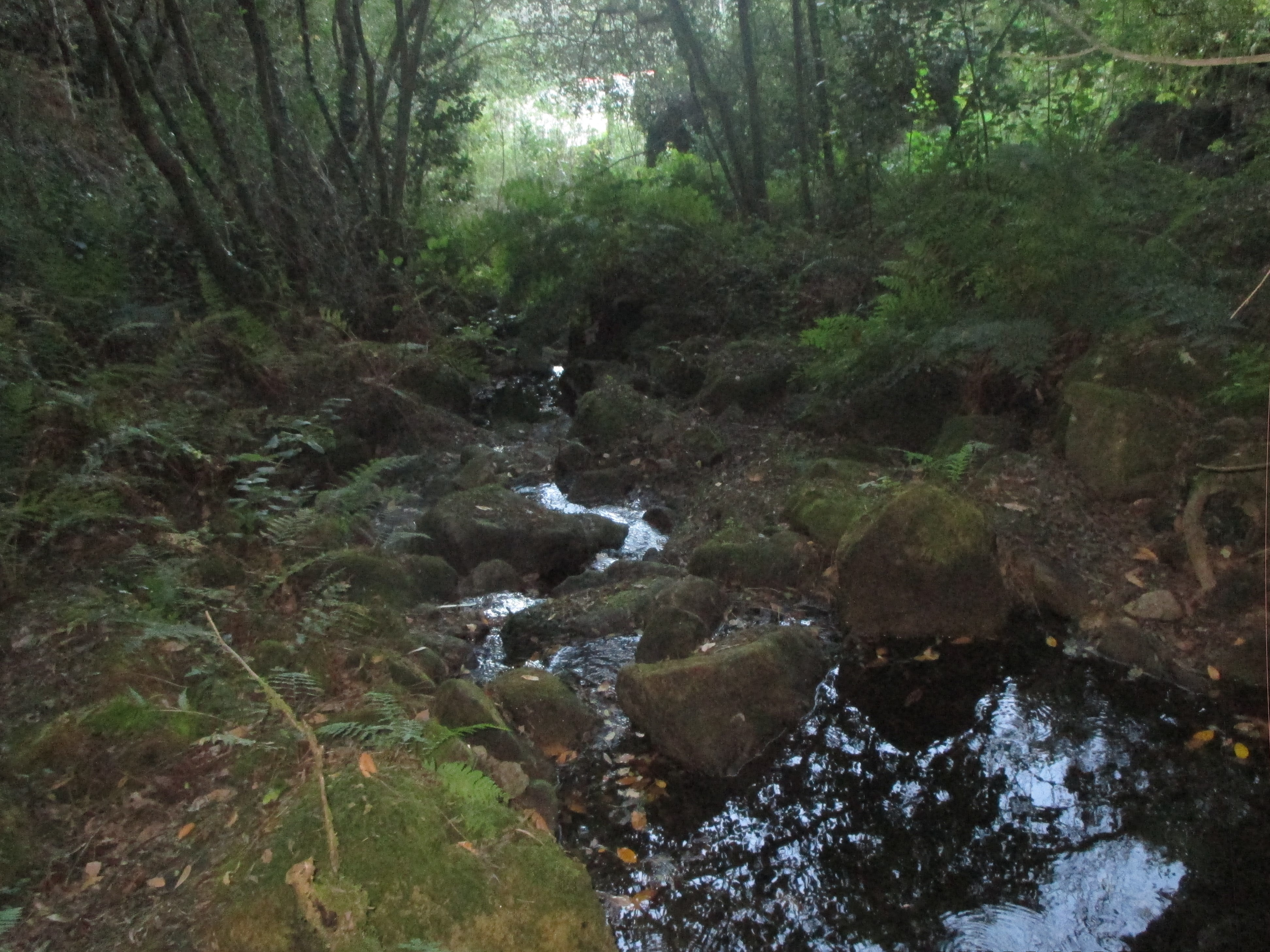 Río de Souto